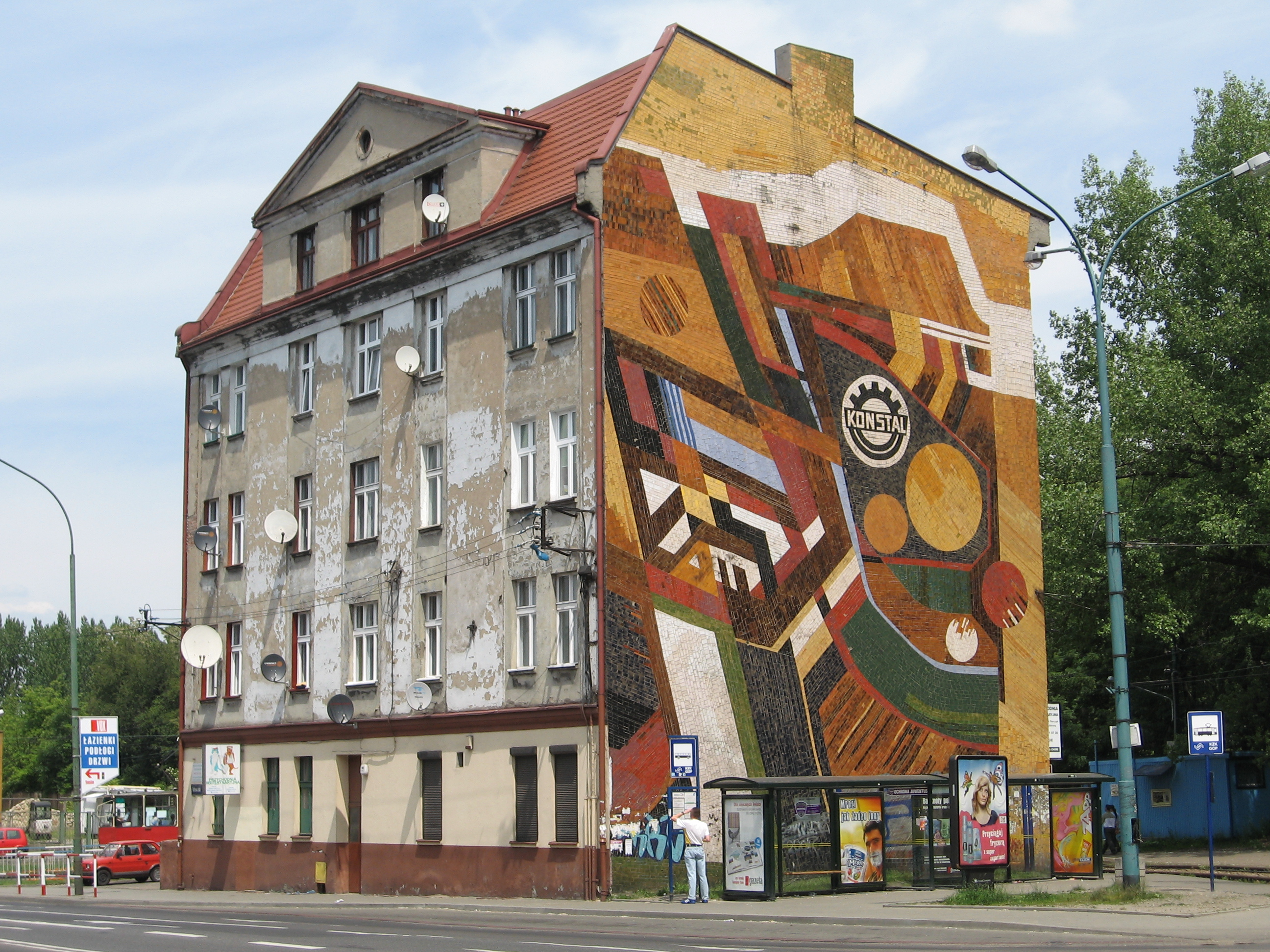 Budynek w Chorzowie (ul. Katowicka 90) ze starą reklamą firmy Konstal, mozaika